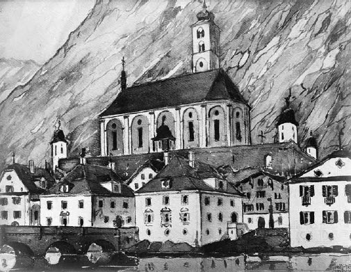 Architekturzeichnung von Neu-Hospental mit Kirche